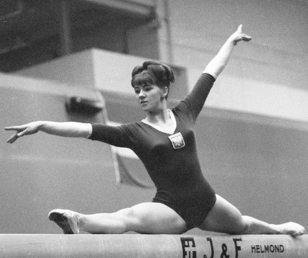 Turnen Nederland tegen Polen dames Gerda Brylka (Polen) op evenwichtsbalk